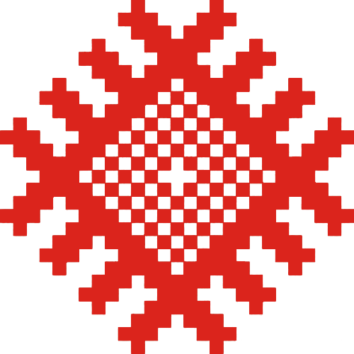 арнамент-узнагарода